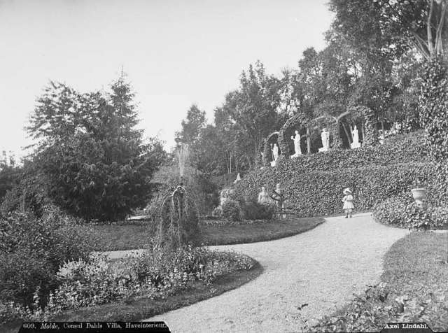 Hage i gamle Molde.